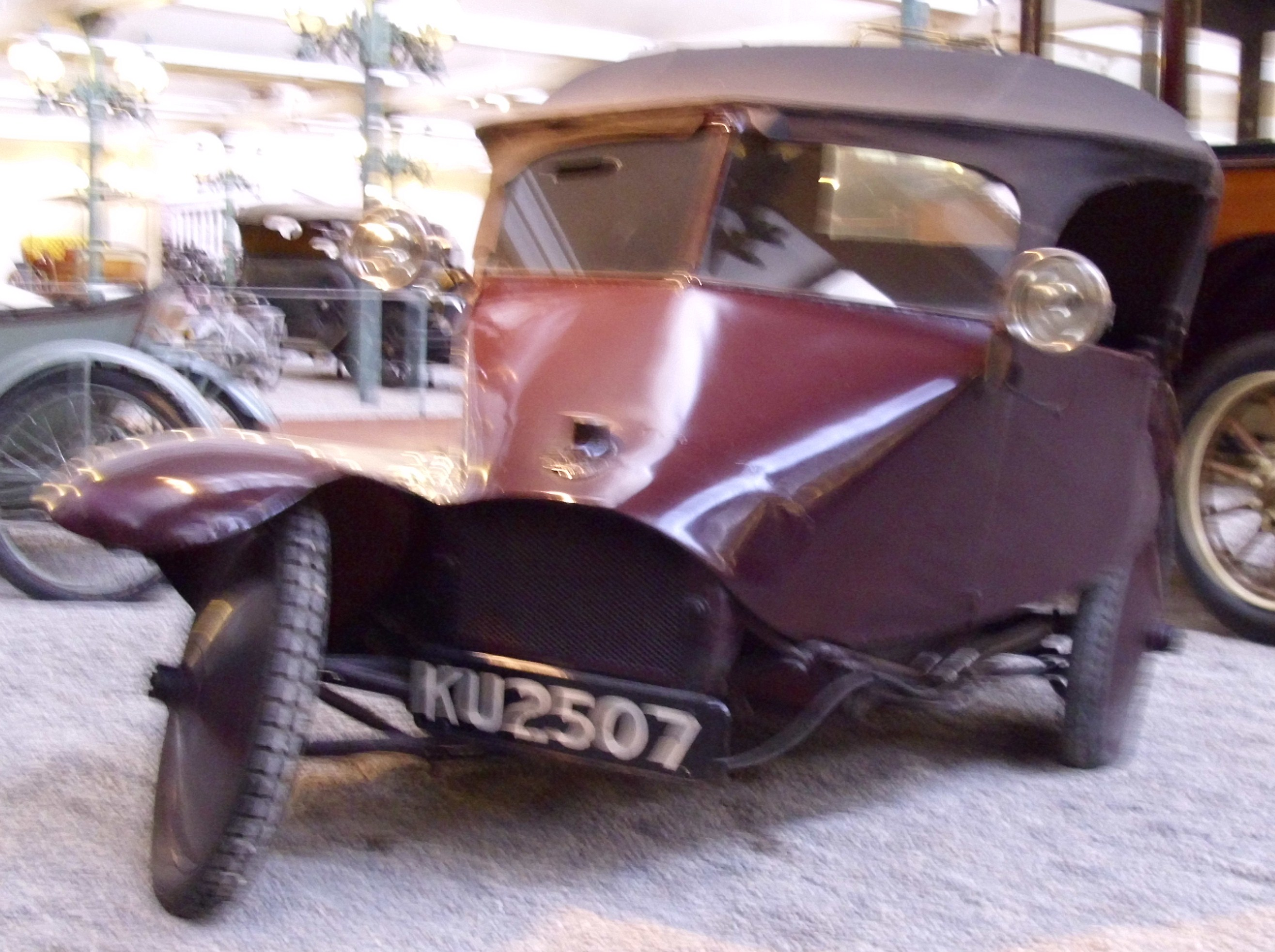 Scott Sociable von 1923 im Musée National de l'Automobile in Mulhouse.